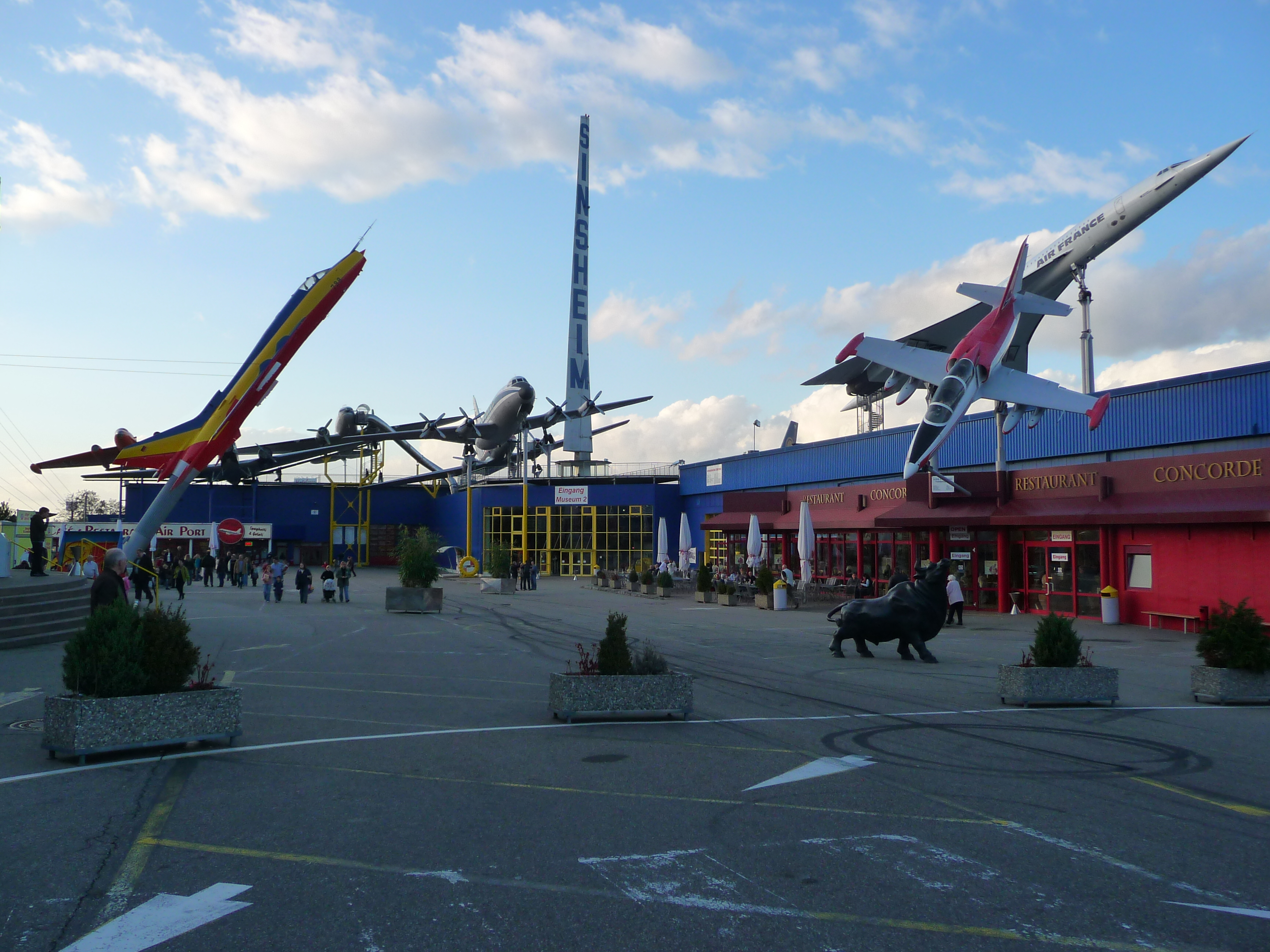 Auto- und Technikmuseum Sinsheim (Rhein-Neckar-Kreis, Baden-Württemberg, Deutschland)